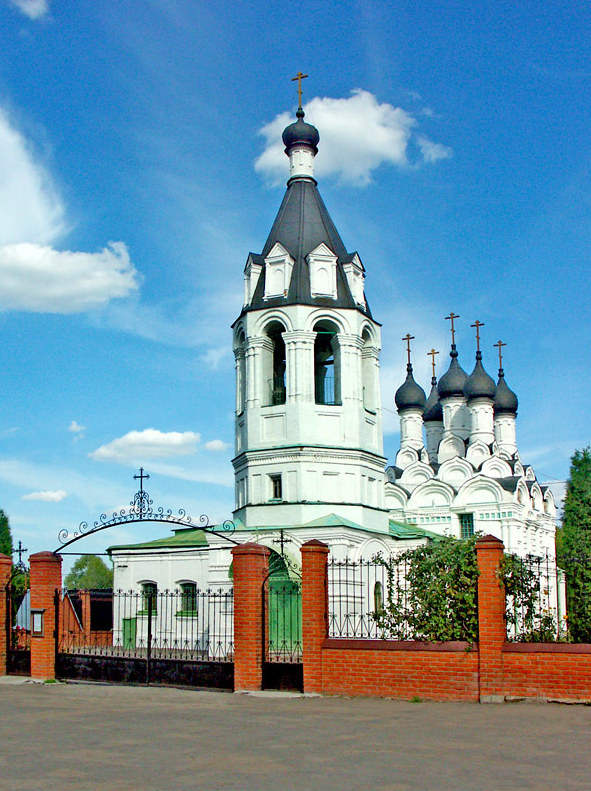 Церковь Иконы Божией Матери Знамение в Кузьминском